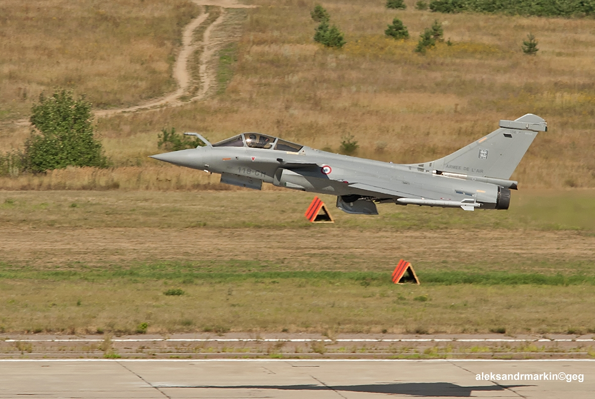 Rafale